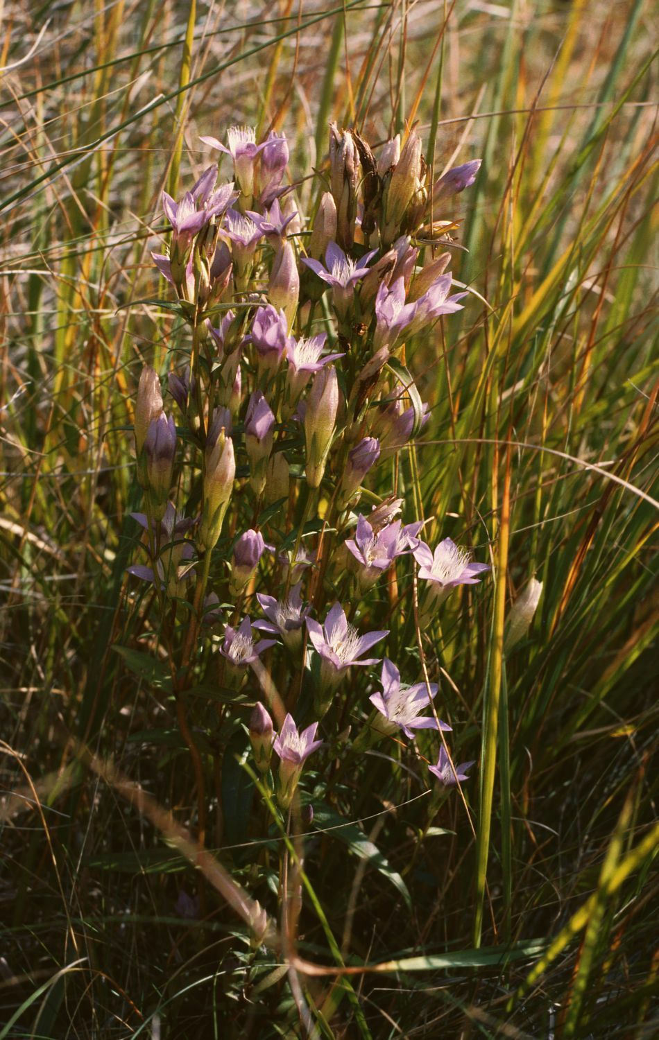 Österreichischer Kranzenzian (Gentianella austriaca), Enziangewächse (Gentianaceae) – Österreich/Austria/Autriche: Burgenland, Seewinkel, „Zitzmannsdorfer Wiesen“ südlich von Weiden am See